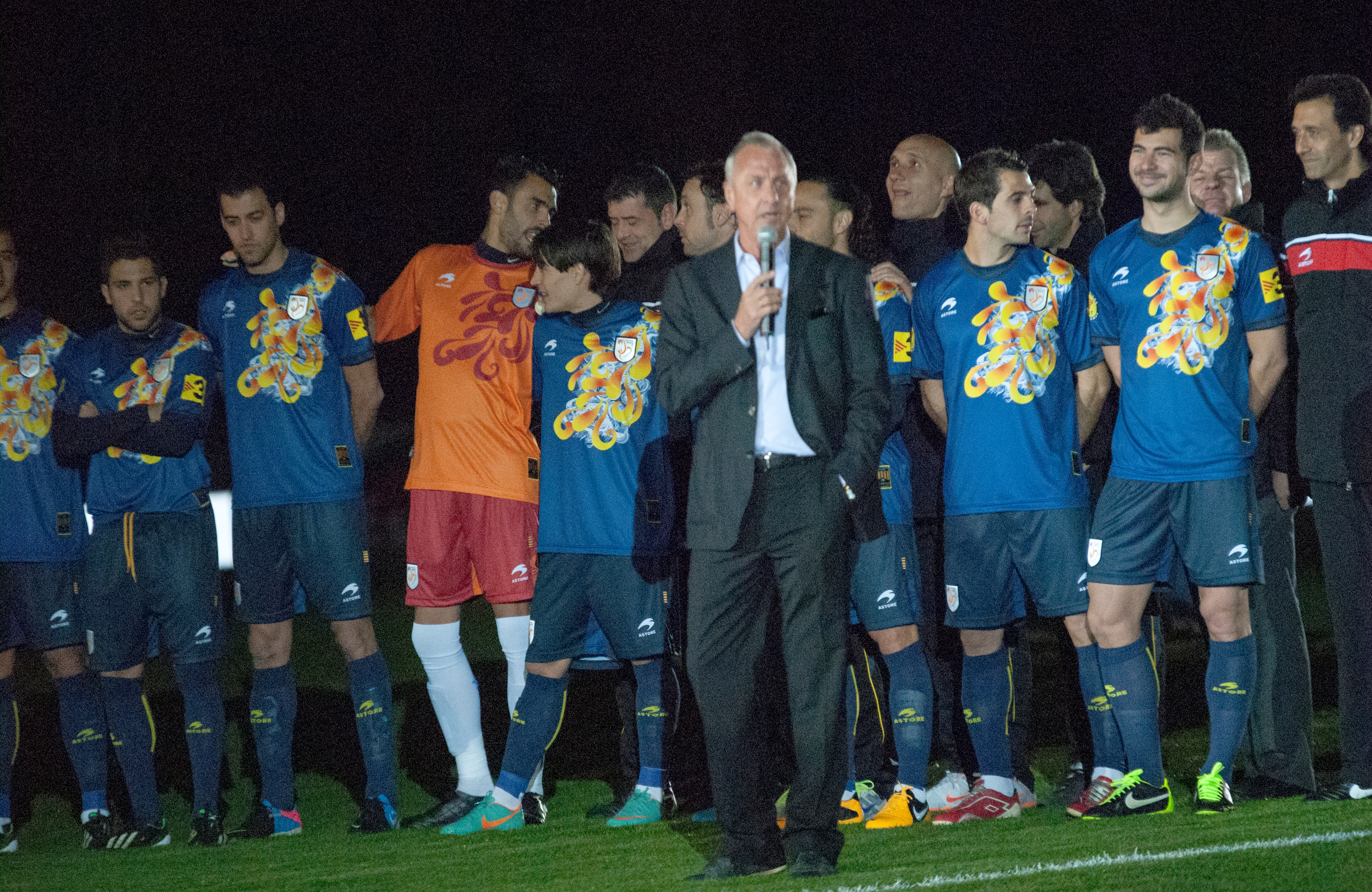 Johan Cruijff parla abans del Catalunya-Nigèria.